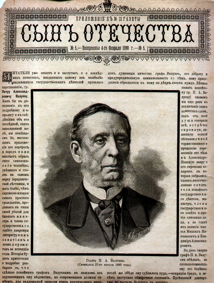 "Сын отечества", газета